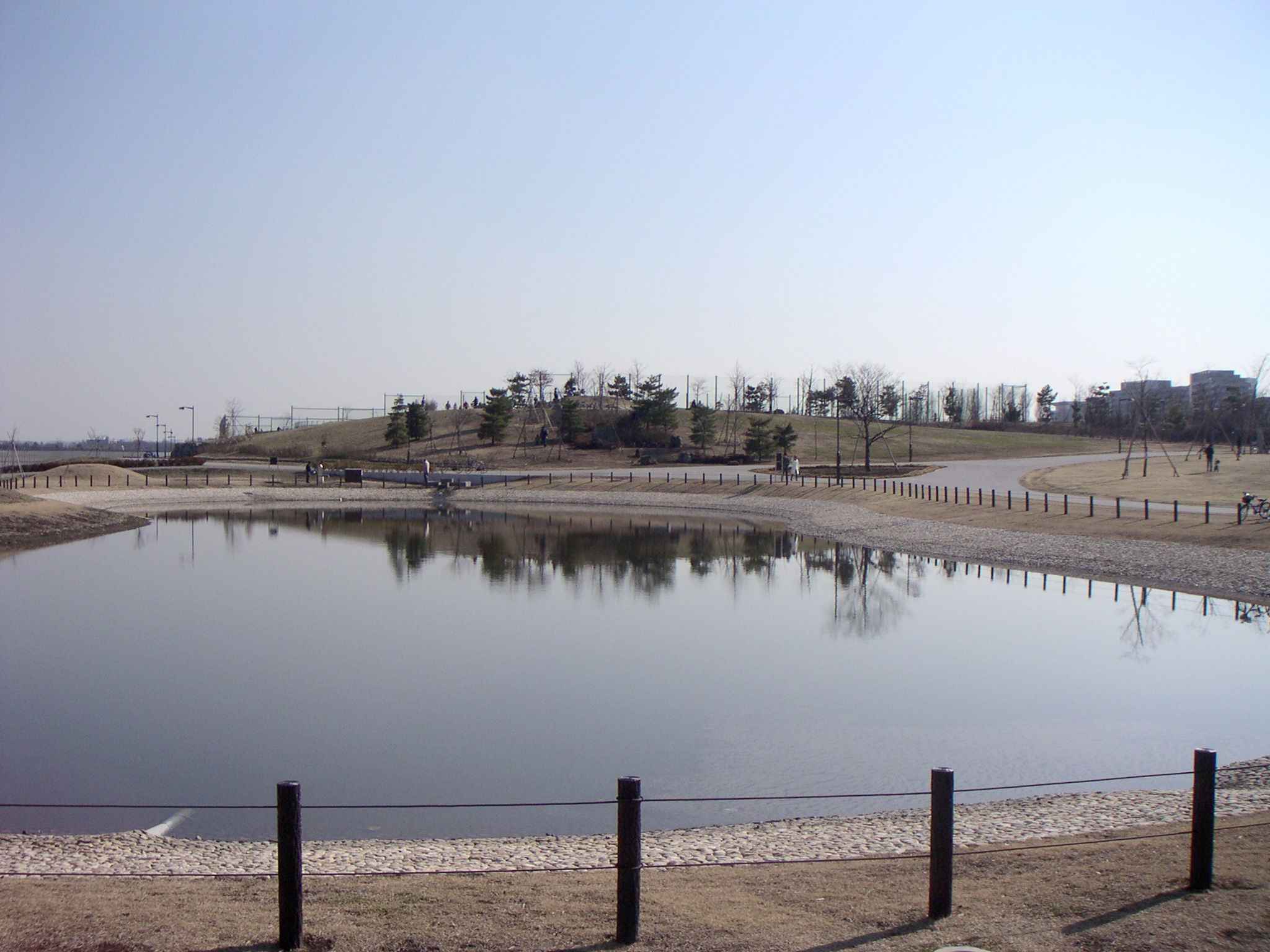 Musashinonomori Park